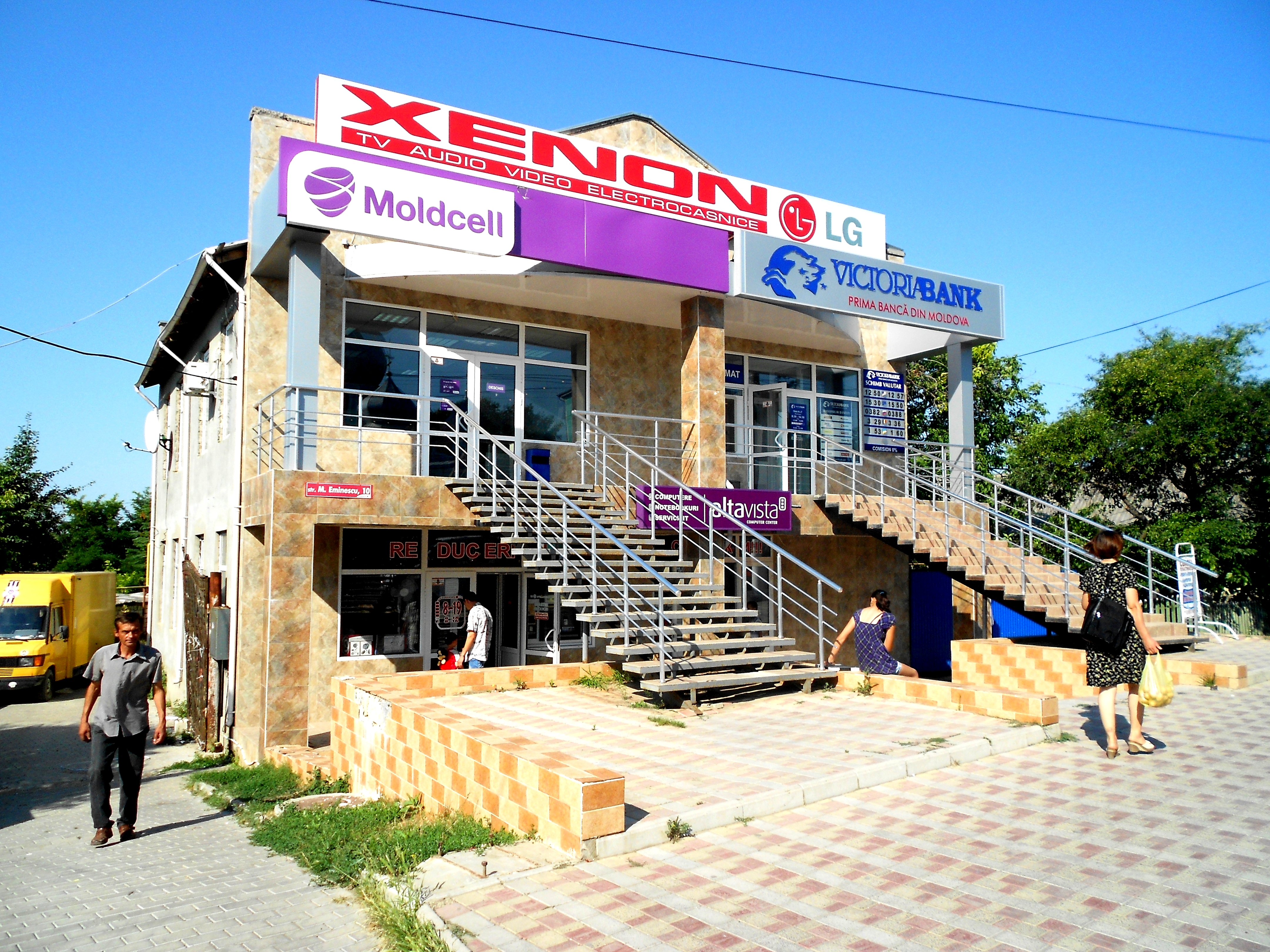 Centru comercial din orașul Fălești, MD